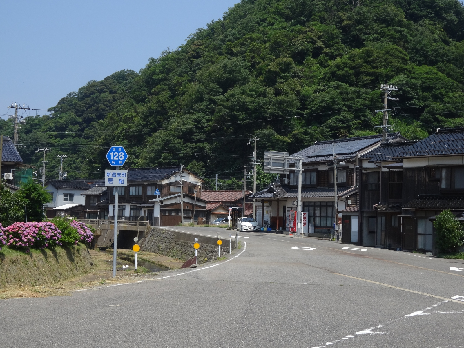 兵庫県道128号居組港居組停車場線（兵庫県美方警察署居組駐在所付近より撮影）